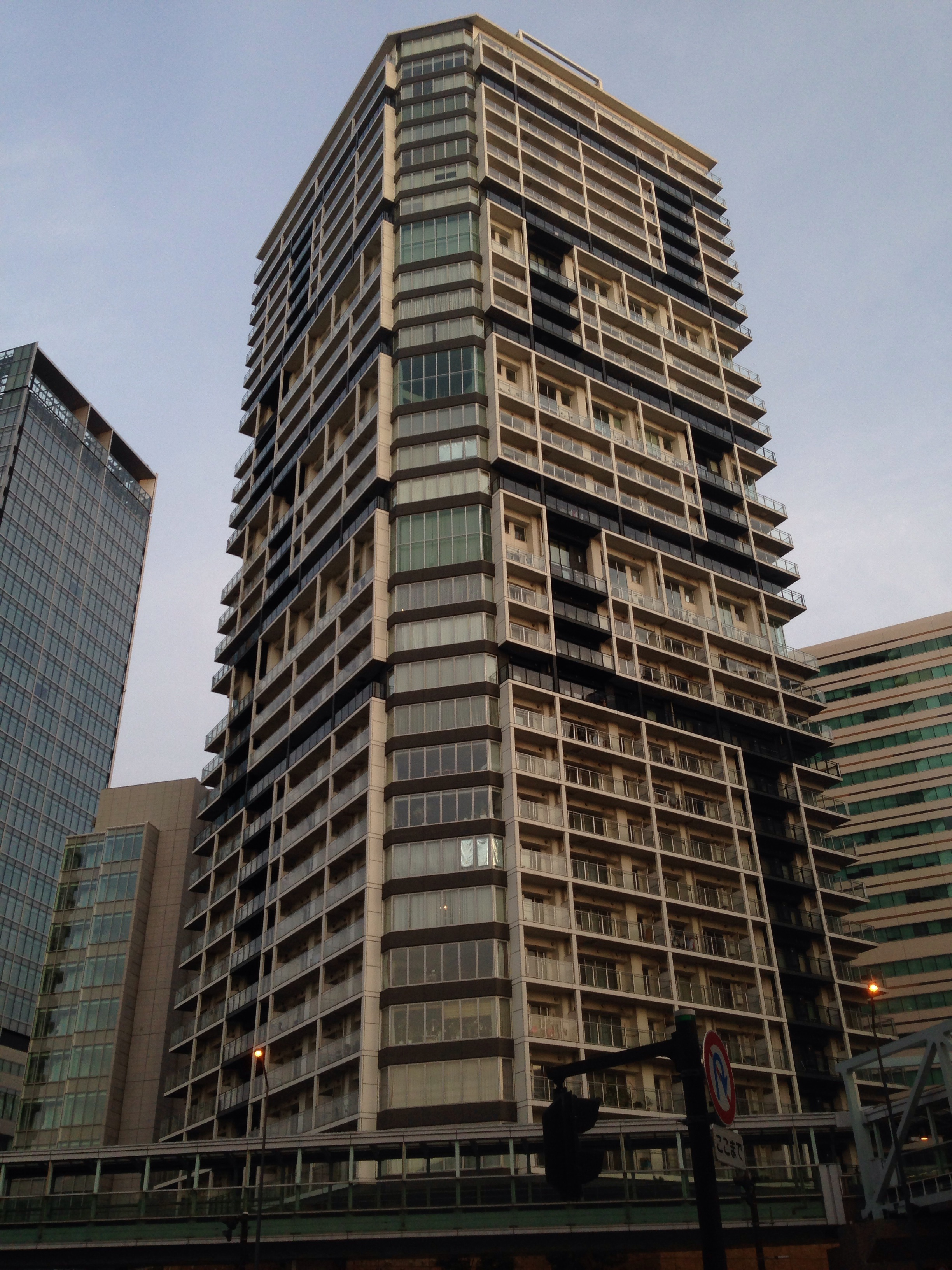 ポートサイド地区にある集合住宅「パークタワー横濱ポートサイド」。